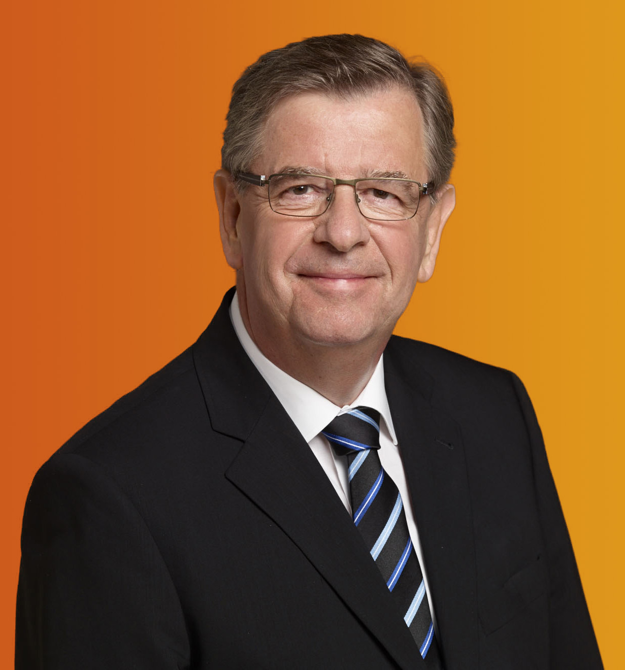 Willi Stächele, 2016 direkt gewählter Abgeordneter in den Landtag von Baden-Württemberg für den Wahlkreis Kehl